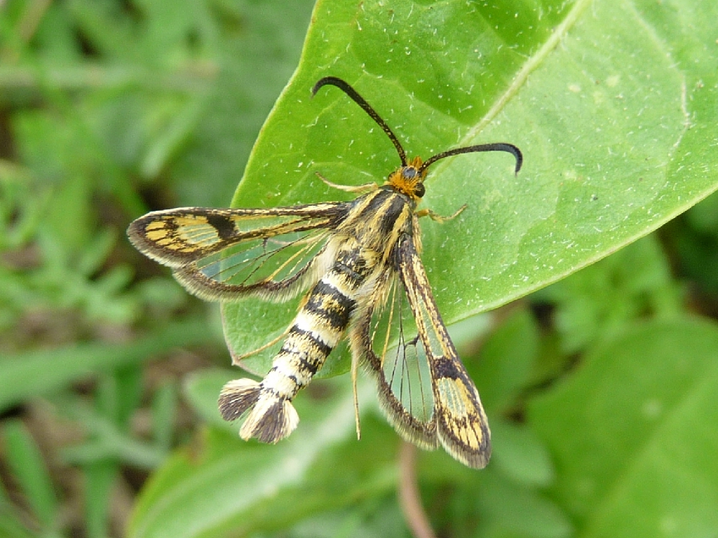 Chamaesphecia empiformis - Czech Republic, Fotografie byla pořízena ve Slavkově u Brna v okrese Vyškov v Jihomoravském kraji